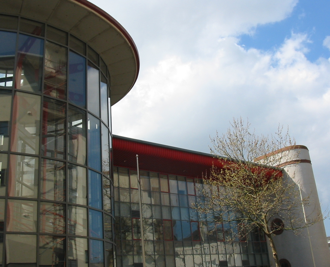 Nrf: Saint Hélyi, Jèrri